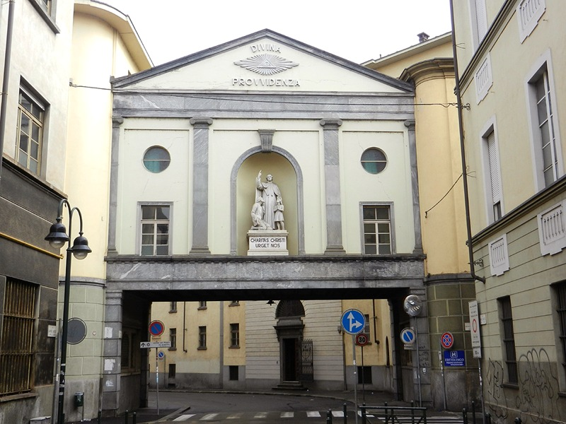 Torino - Piccola Casa della Divina Provvidenza (Cottolengo)